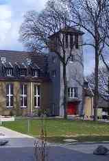 Bildbeschreibung: Kirchliche Hochschule Wuppertal (evang.) Quelle: selbst fotografiert Fotograf/Zeichner: Gobel Datum: 7. April 2006